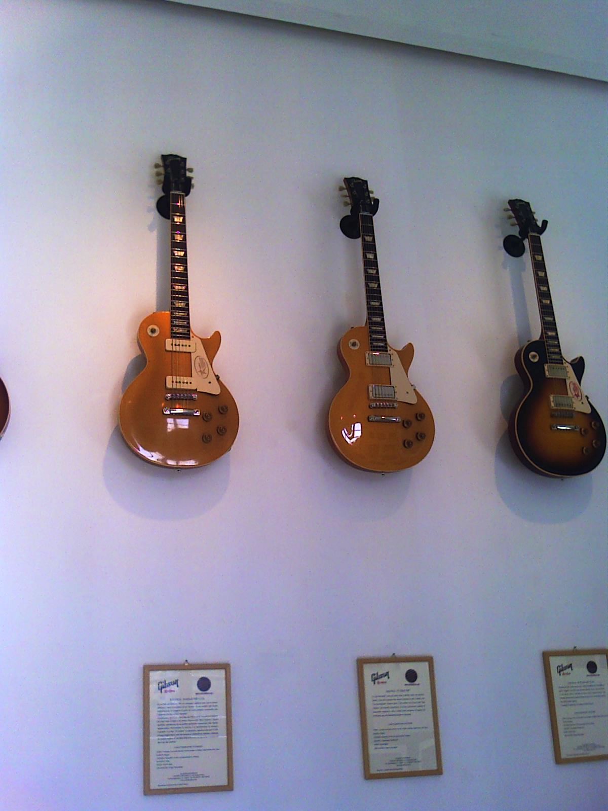 Les Paul Gold Tops